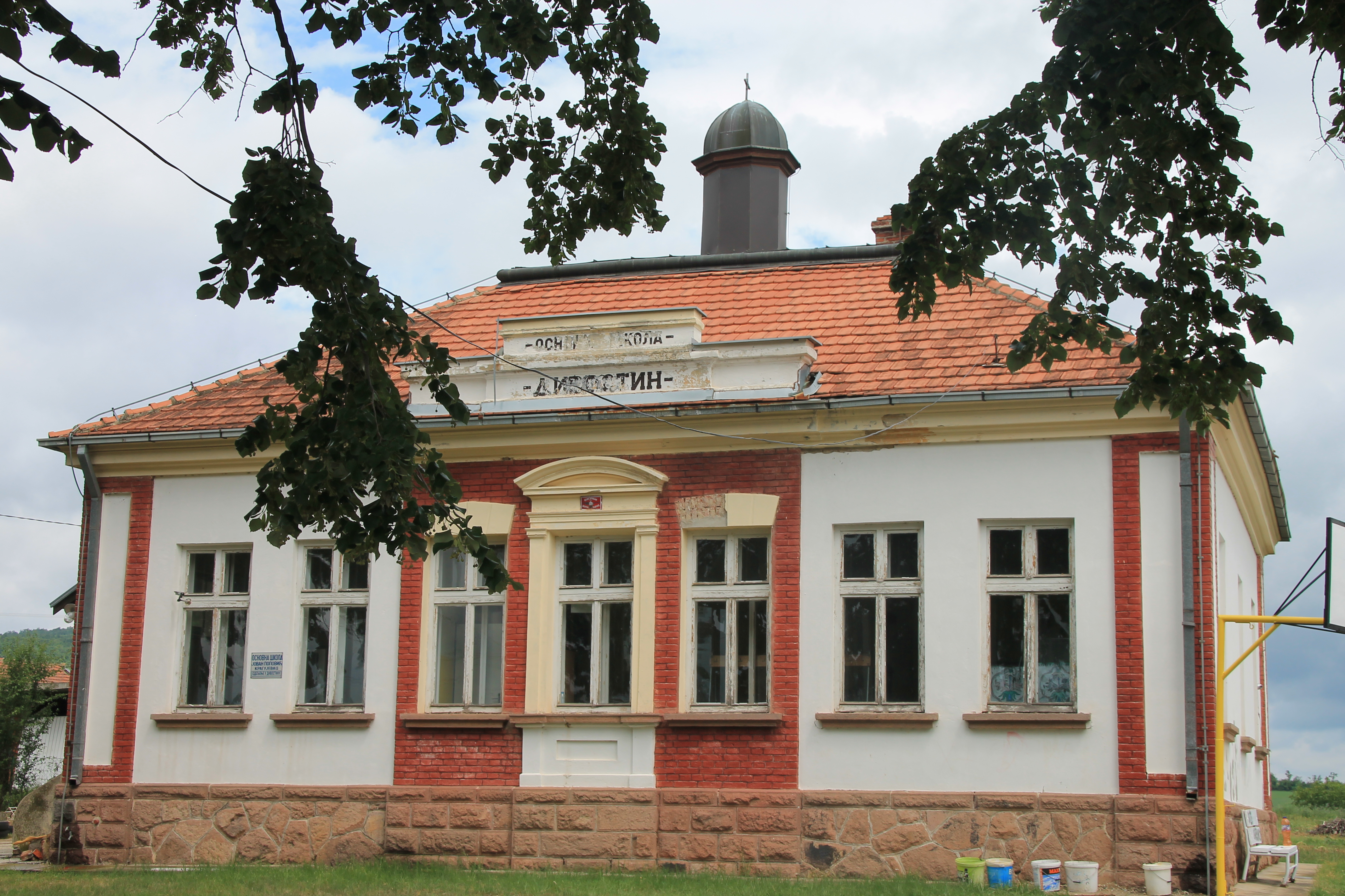 Divostin